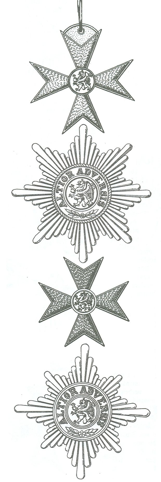 Four grades of th Orderof the Friffen of Mecklenburg -Schwerin (1884 - 1918)